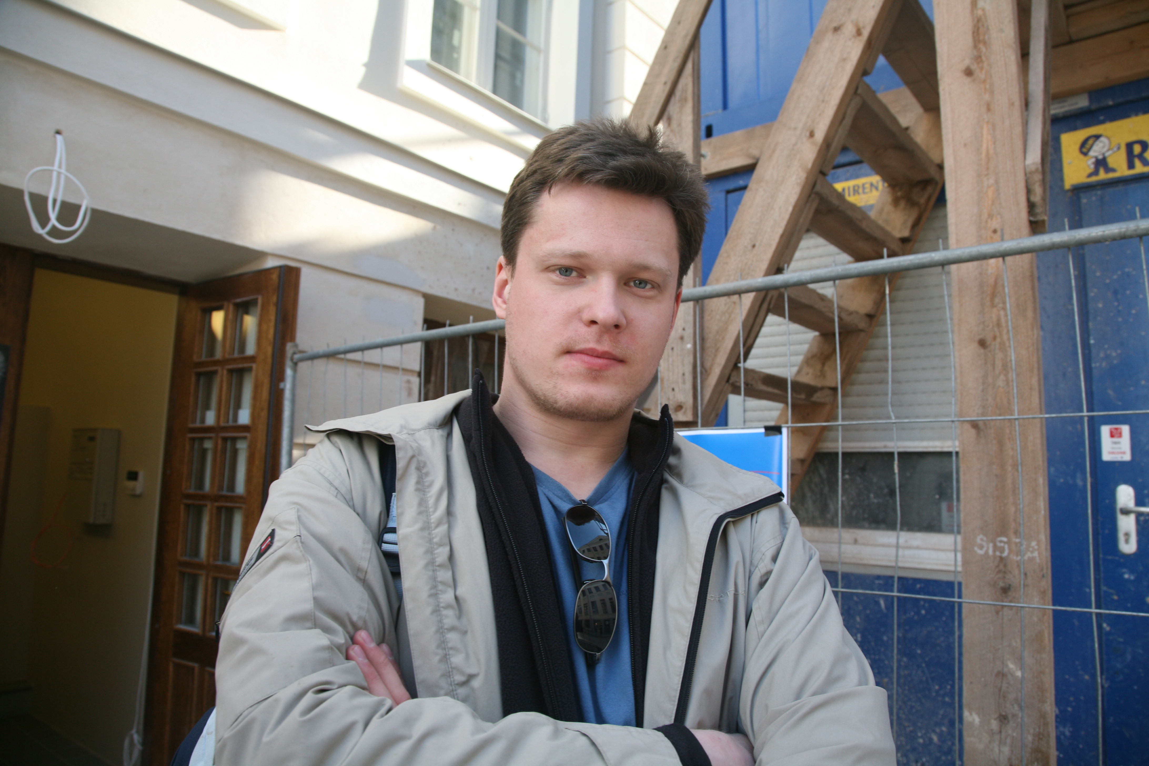 Wimberg 2007. aasta maikuus Tartus Athena ees